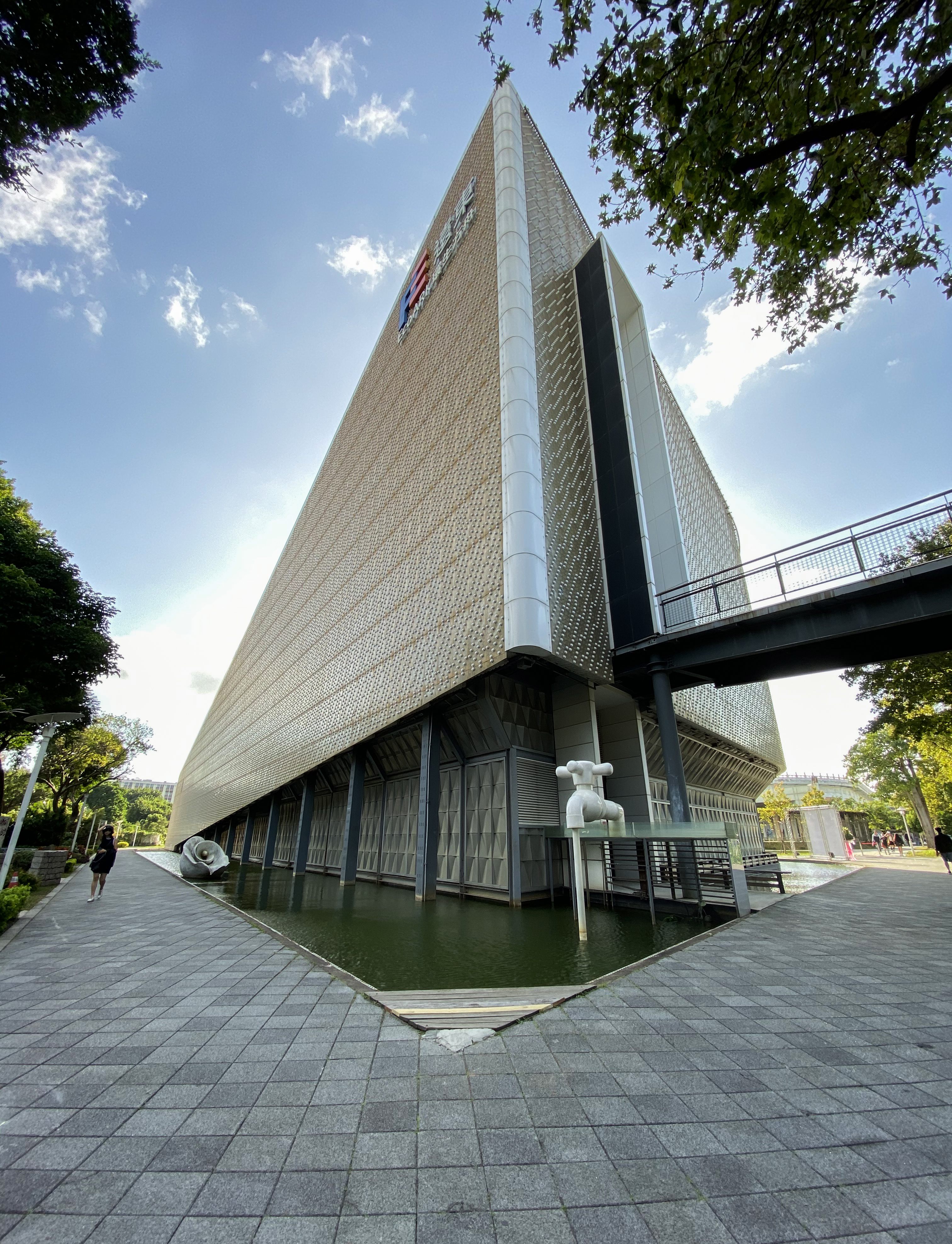 臺北花博遠東流行館